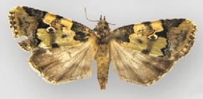 Bryolymnia picturata female